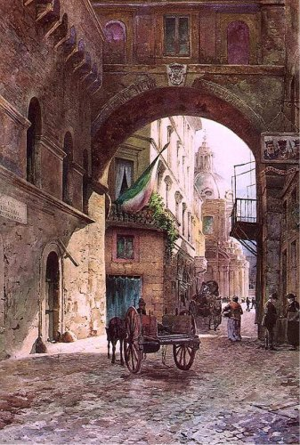 Arco di San Marco in Rome (rione Campitelli)